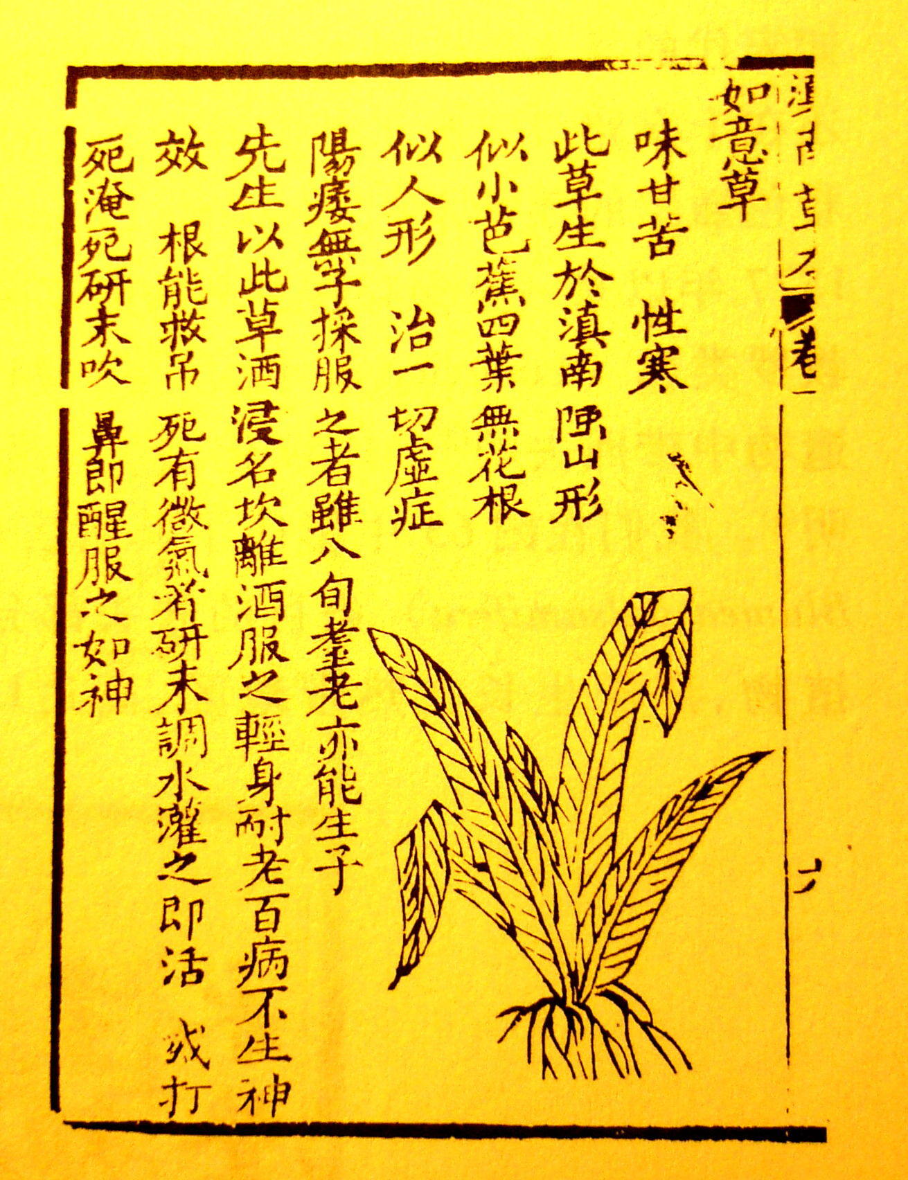 中文（新加坡）: 阗南本草如意草